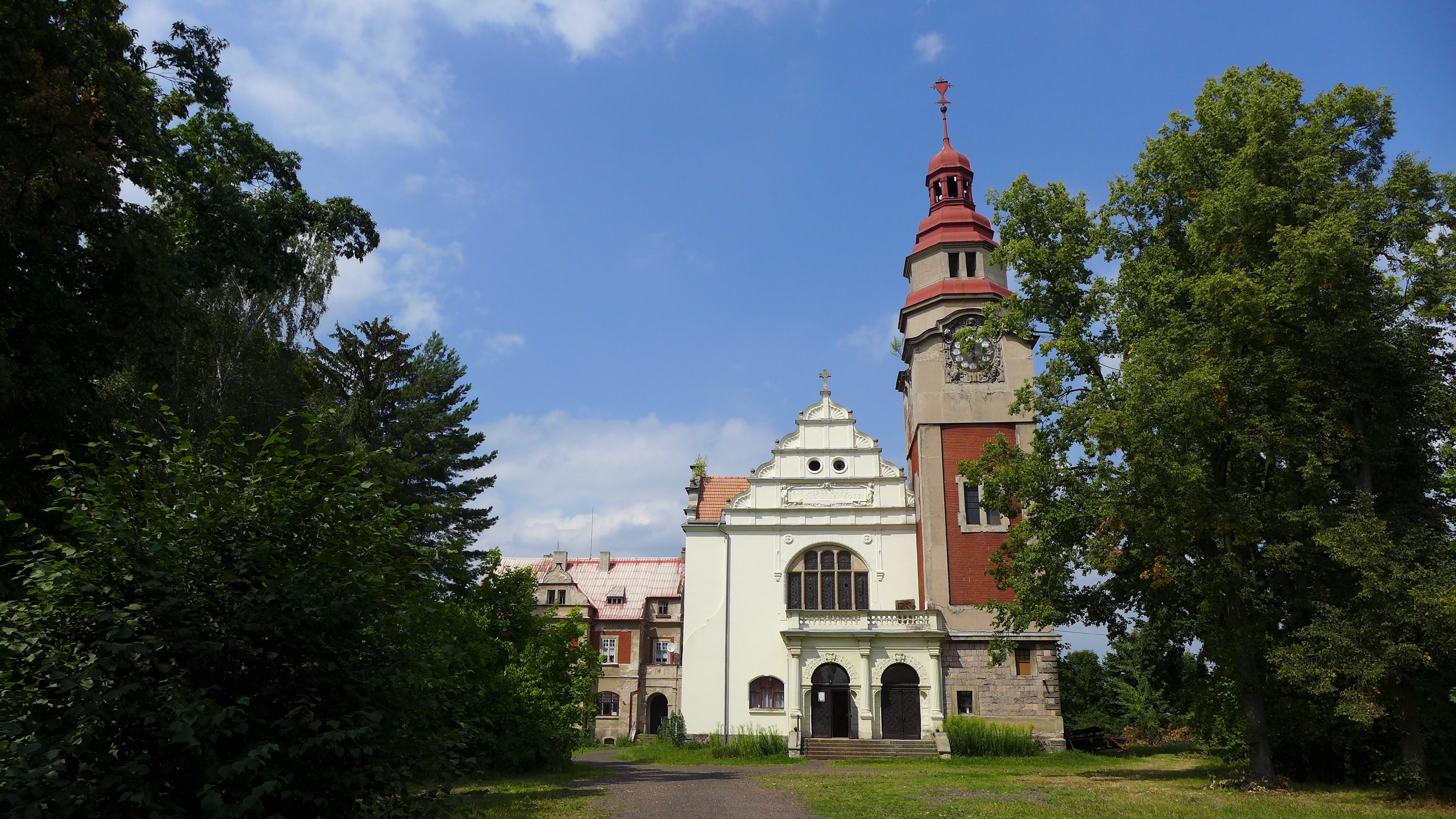 Kostel Zmrtvýchvstání s farou, Husova 182, Broumov, Broumov.